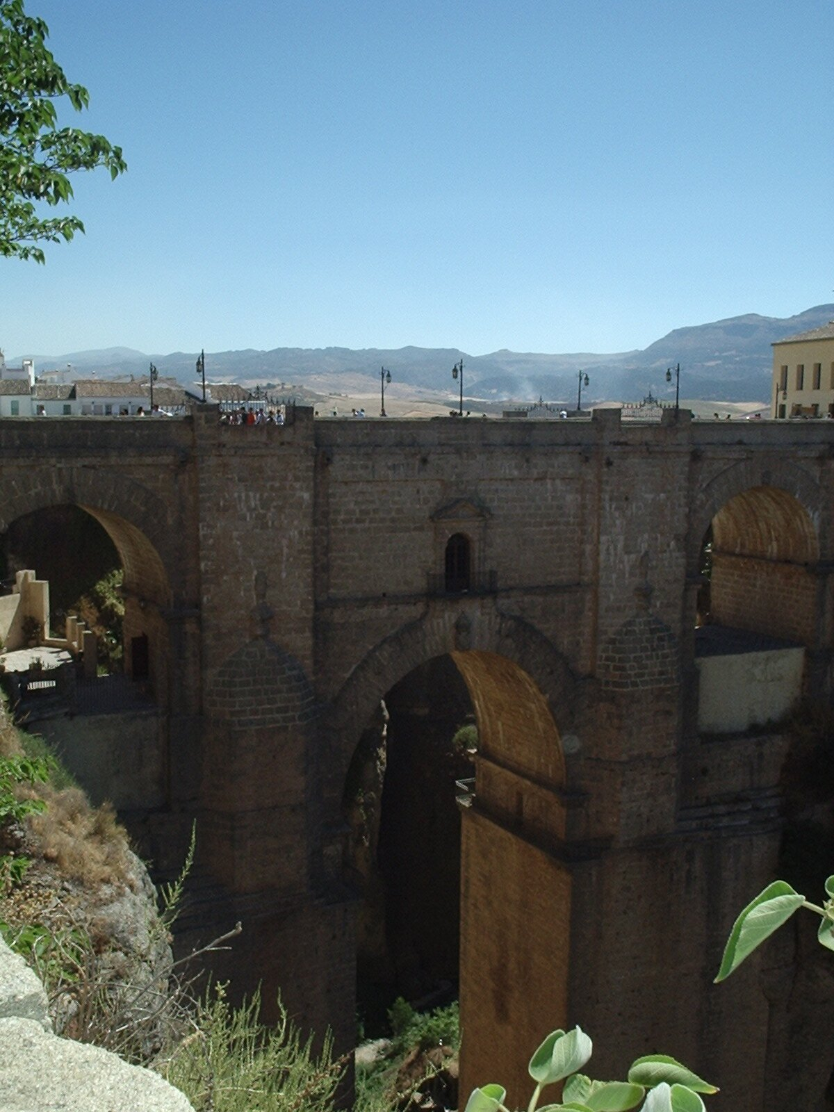 Eigen werk (2003)